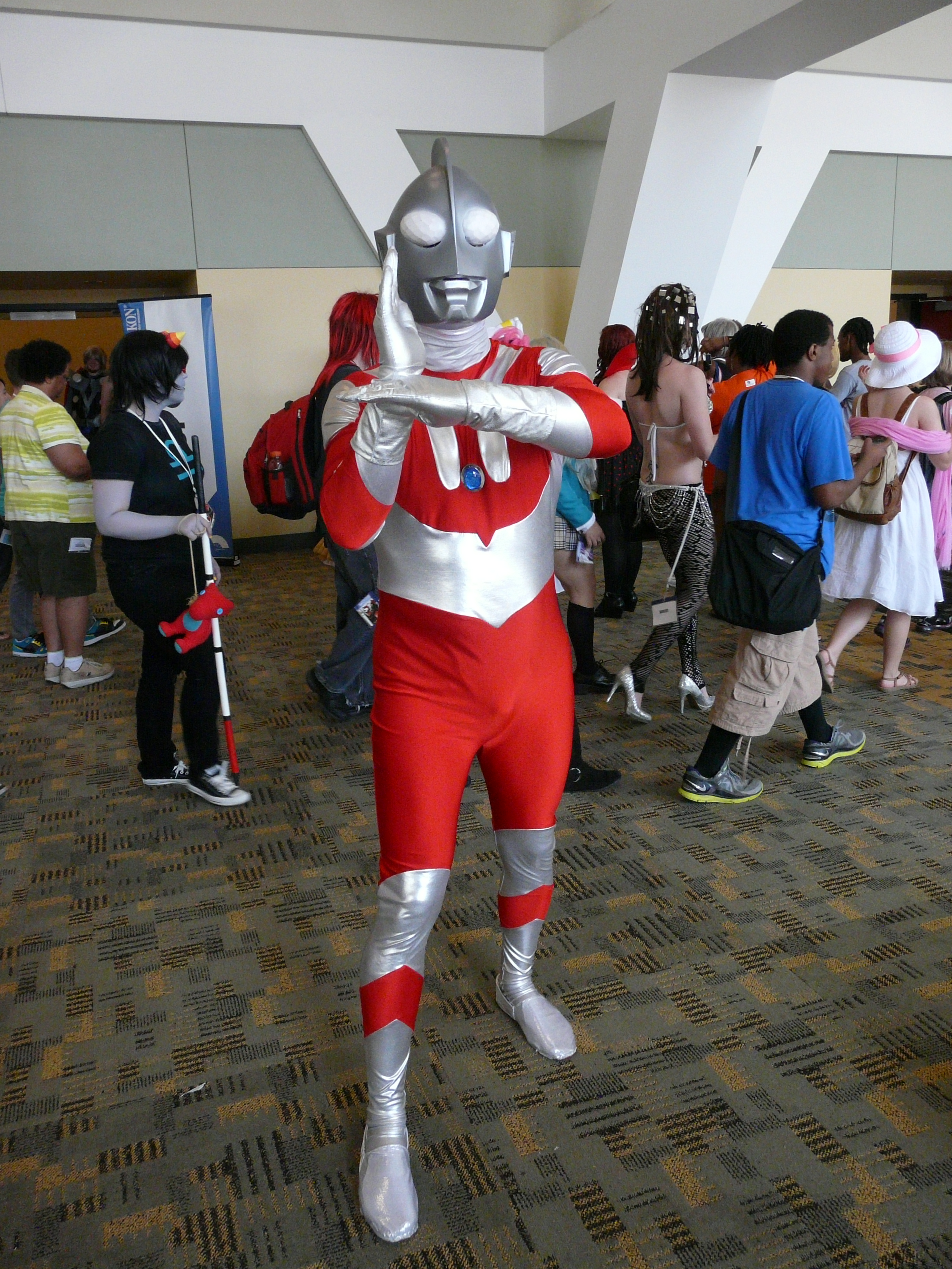 Otakon 2012 cosplay